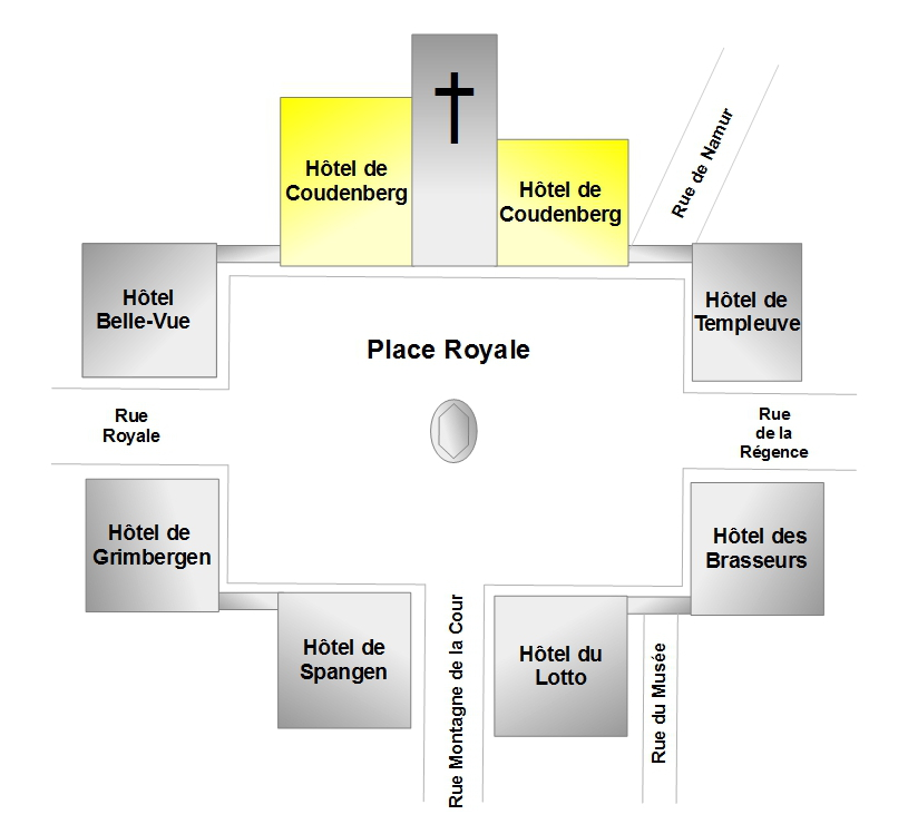 Belgique - Bruxelles - Plan de la place Royale - Hôtels de Coudenberg